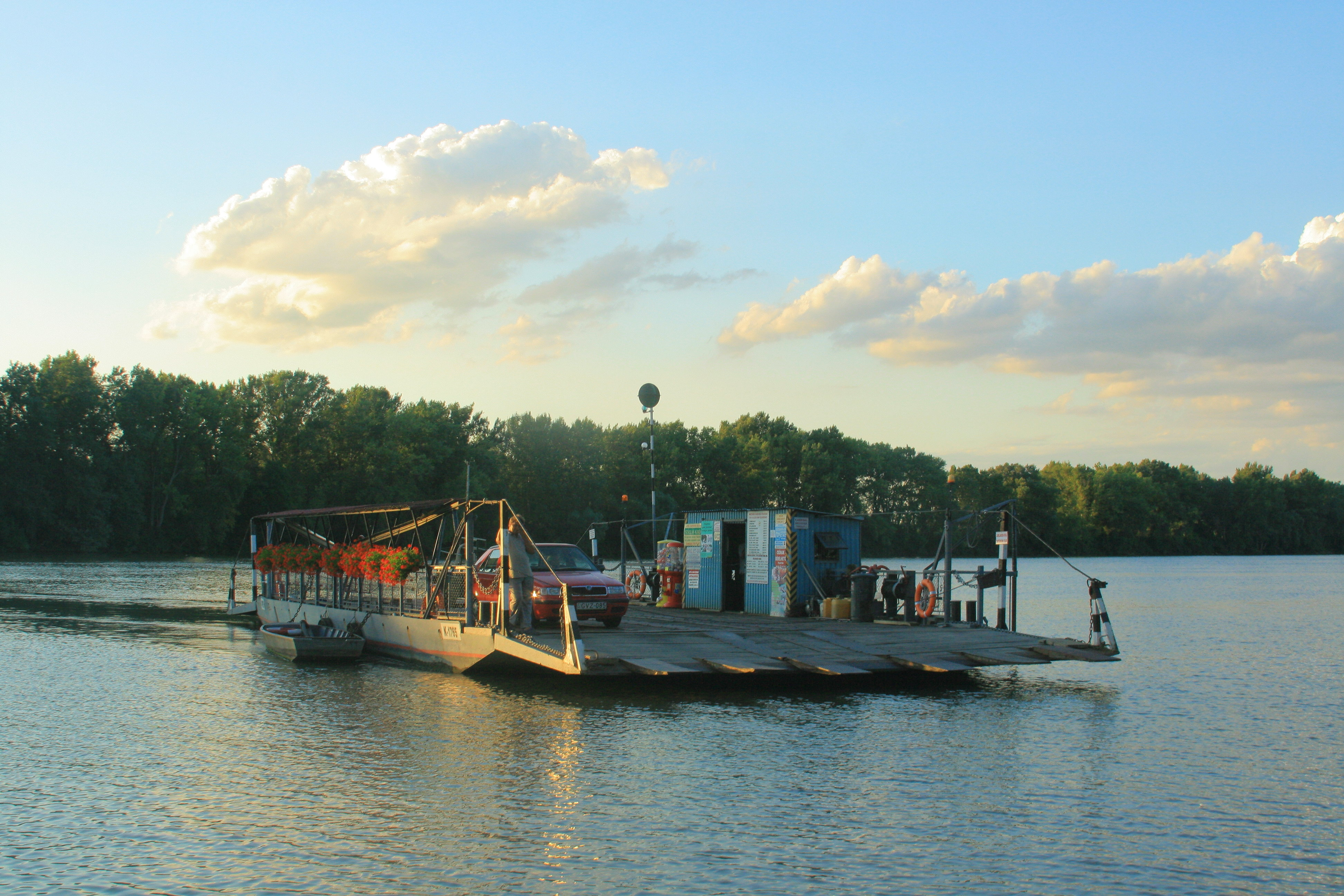 Tiszacsege, 4066 Hungary